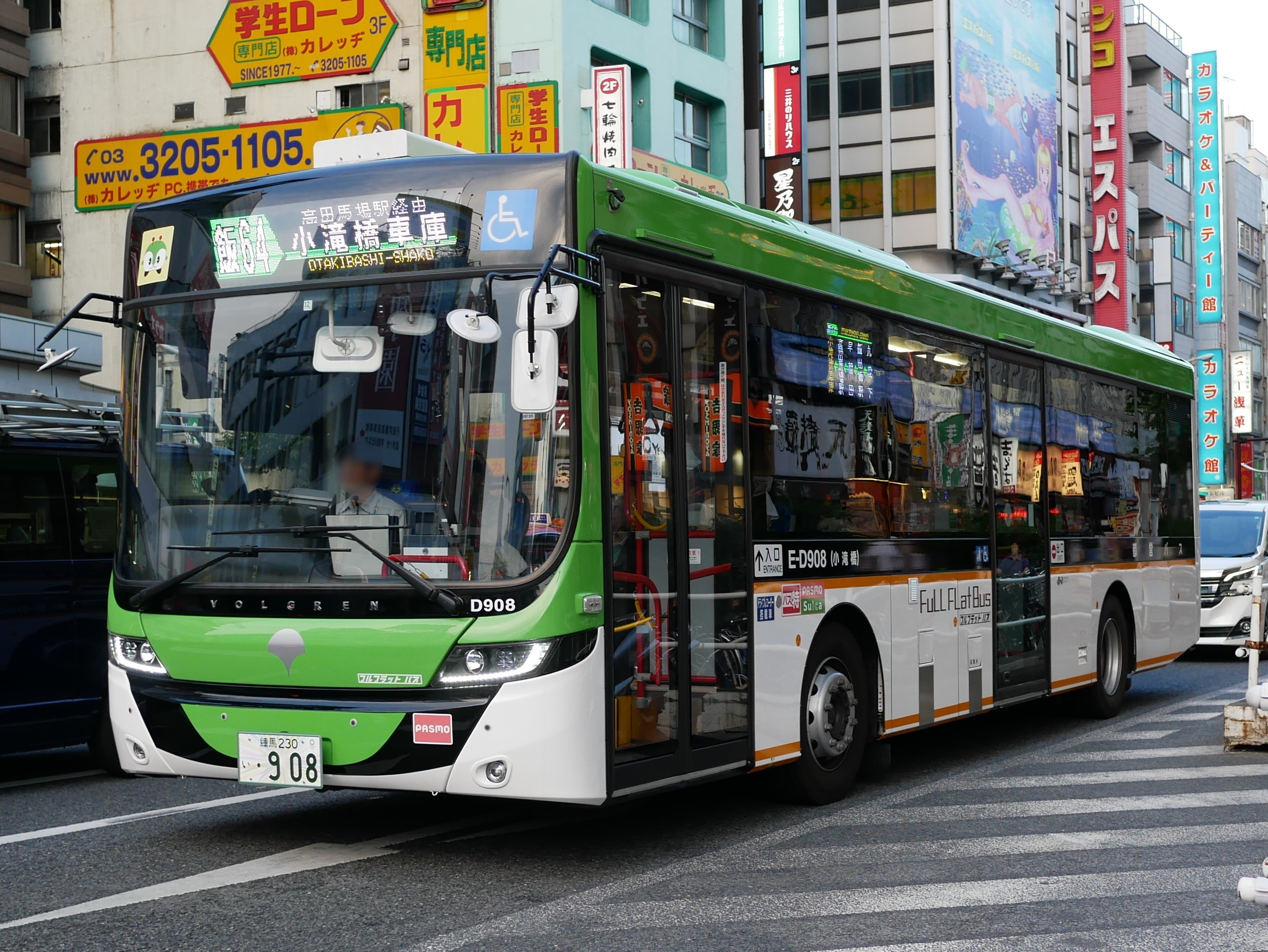 都営バスが運行するボルグレン社のフルフラットノンステップバスの写真です